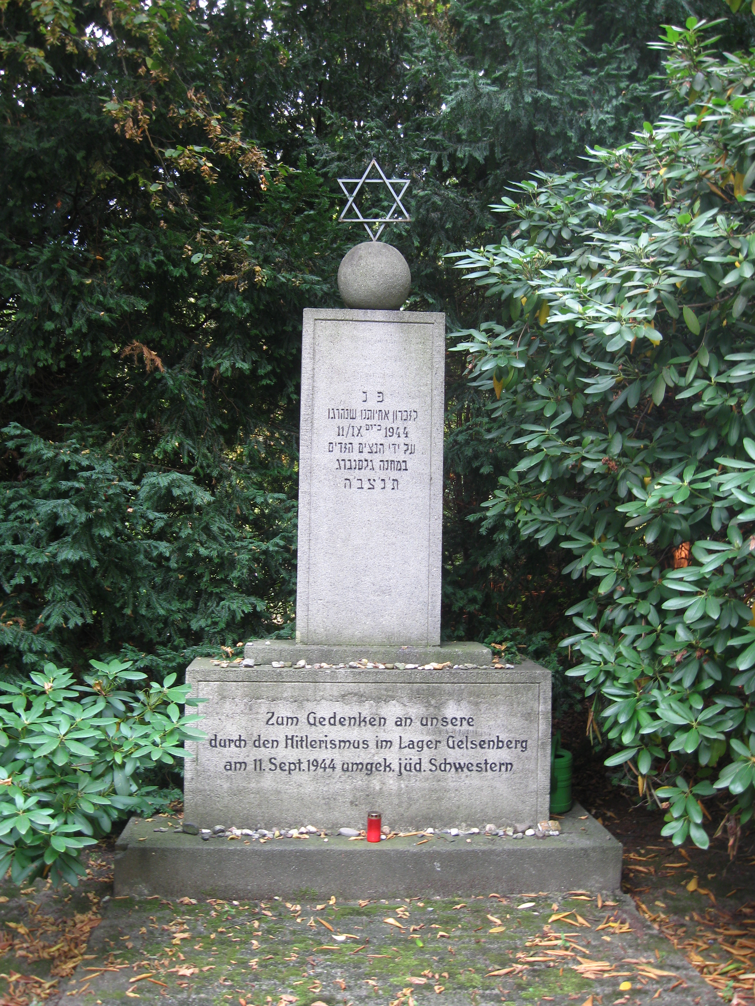 1948 auf dem Gelände der Hydrierwerke Gelsenberg Benzin AG errichtete, Anfang der 1950er Jahre auf den Friedhof Horst-Süd verlegte Gedenkstätte am Grab der ca. 150 jüdischen Zwangsarbeiterinnen aus dem Außenlager des KZ Buchenwald in Gelsenkirchen-Horst (davon 140 seit 2003 namentlich bekannt), die am 11. Sept. 1944 bei der Bombardierung des Werkes umkamen, weil es ihnen verboten war, Schutzräume aufzusuchen. Näheres siehe im Text der Gedenktafel.